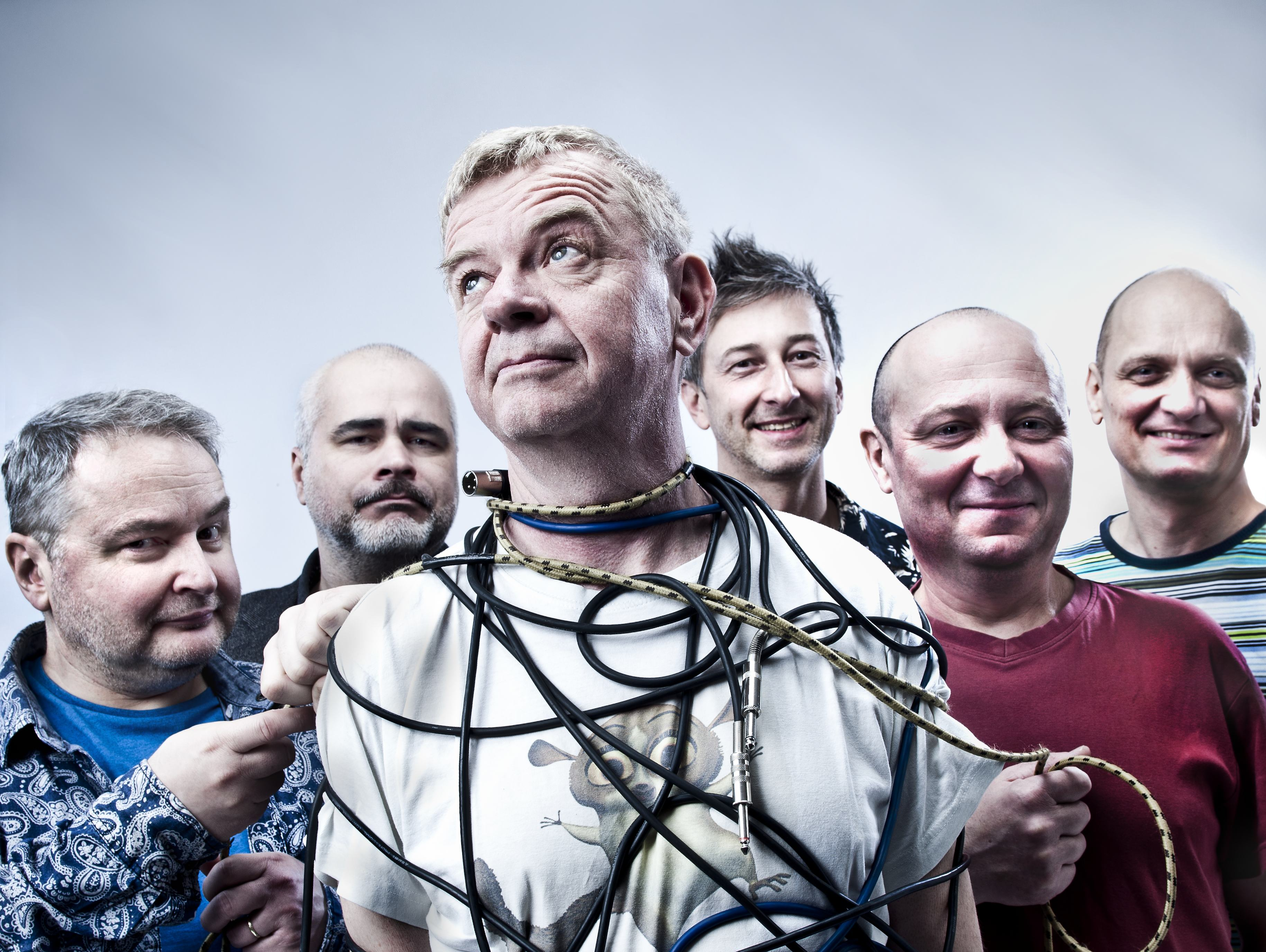 Skupina Mňága a Žďorp promo foto